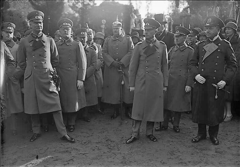 Die feierliche Enthüllung eines Ehrenmals für die 15 tausend im Weltkriege gefallenen Sanitäter in Potsdam. Anwesend waren der Reichswehrminister Groener, der Chef der Marine Admiral Dr. Raeder und der Generalleutnant Hasse.